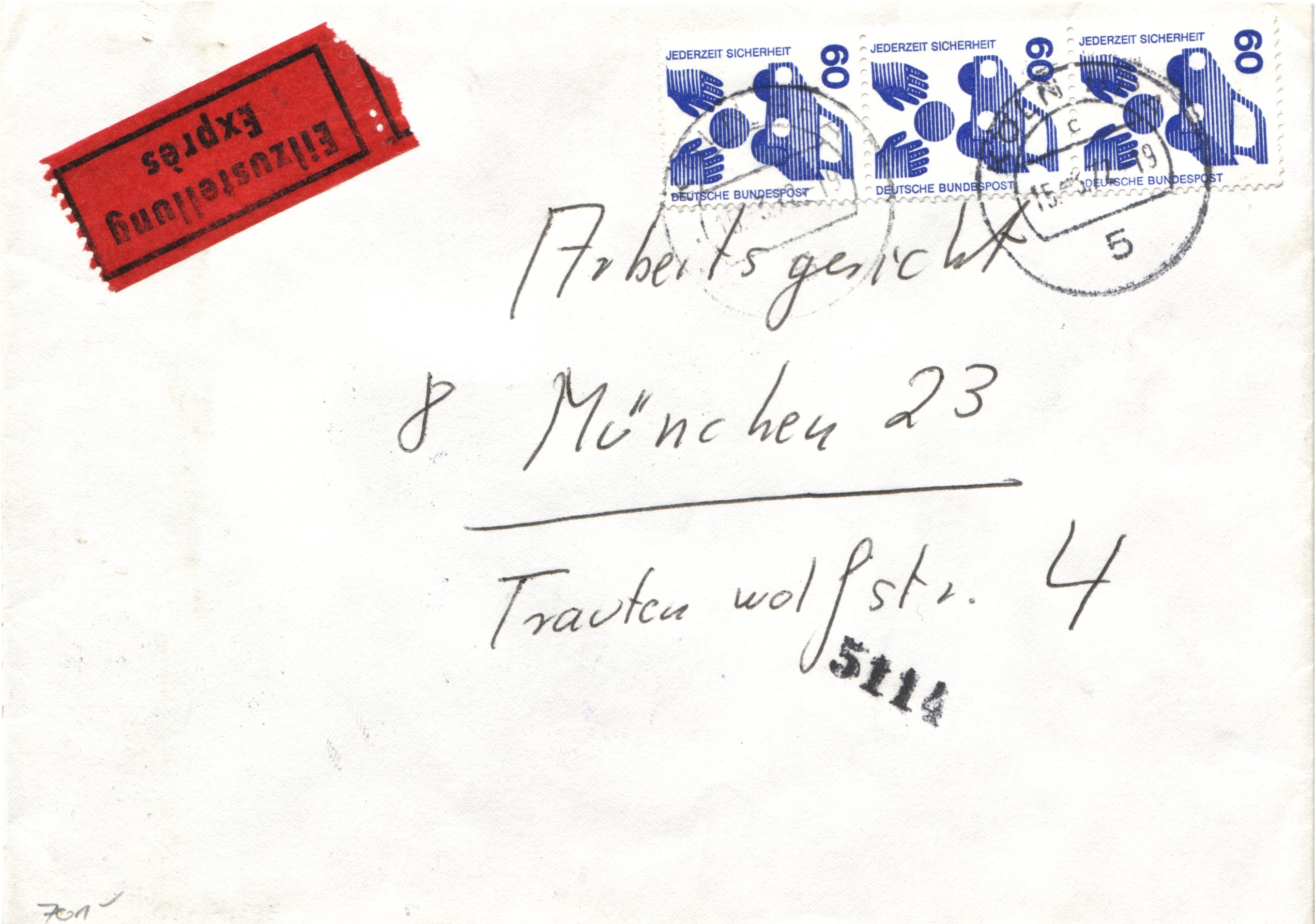 Vorderseite eines Eil-Briefes nach München mit vorderseitigen Abschlag des Rohrpost-Numeratorstempels, der in München auf Sendungen, die per Rohrpost befördert wurden, seit dem 19. Jahrhundert vorkommt.